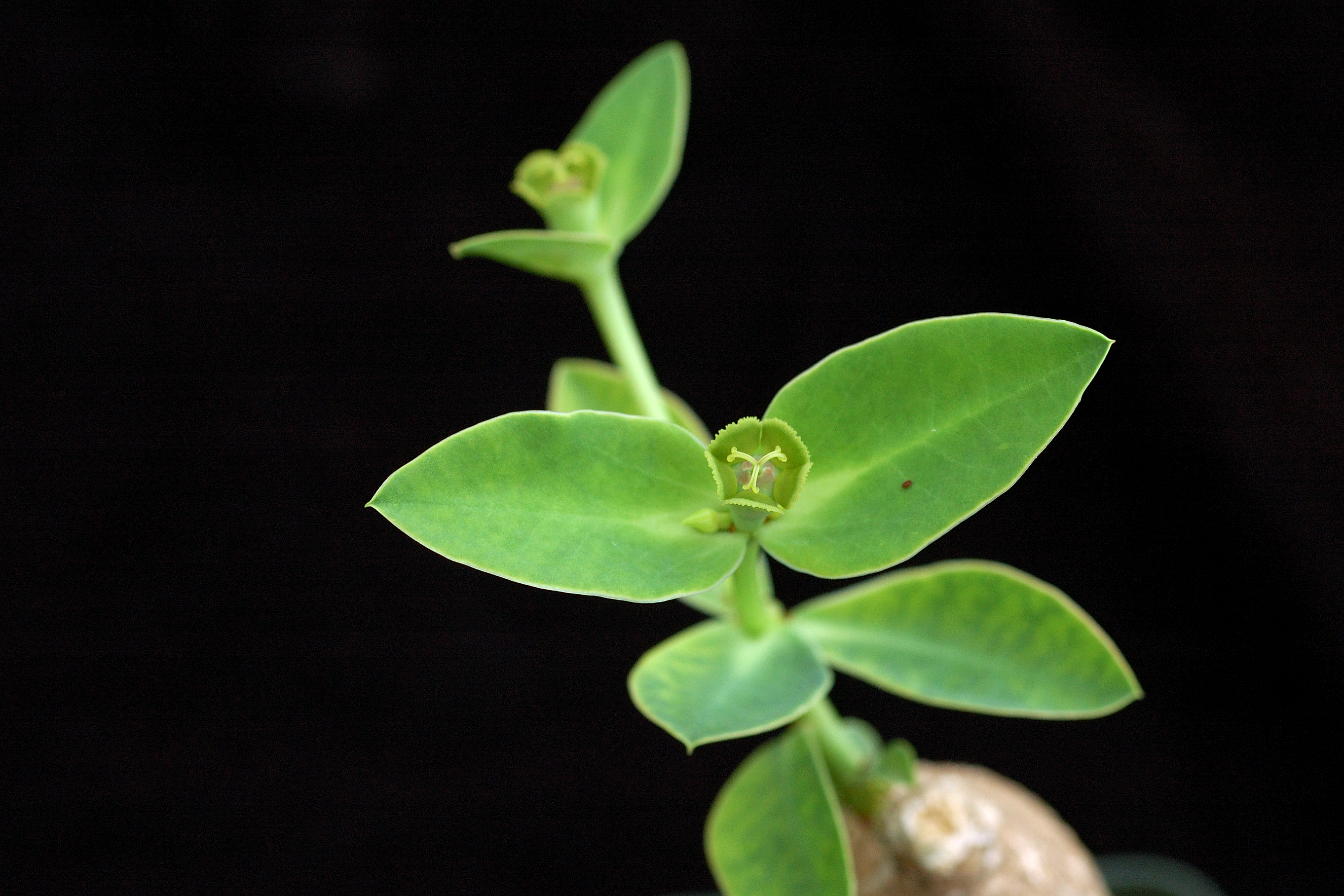 Euphorbia maritae